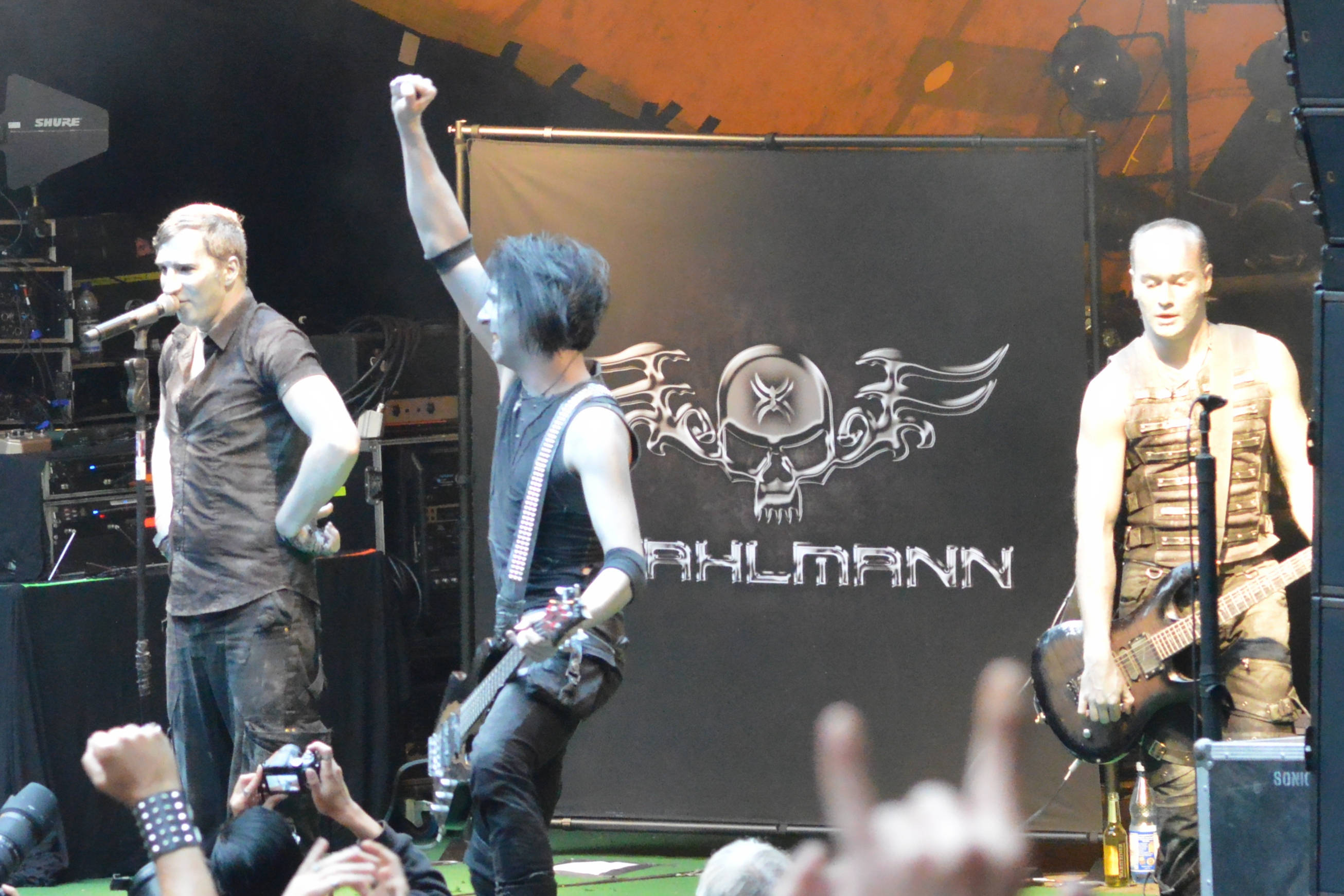 Stahlmann beim Feuertal-Festival 2013